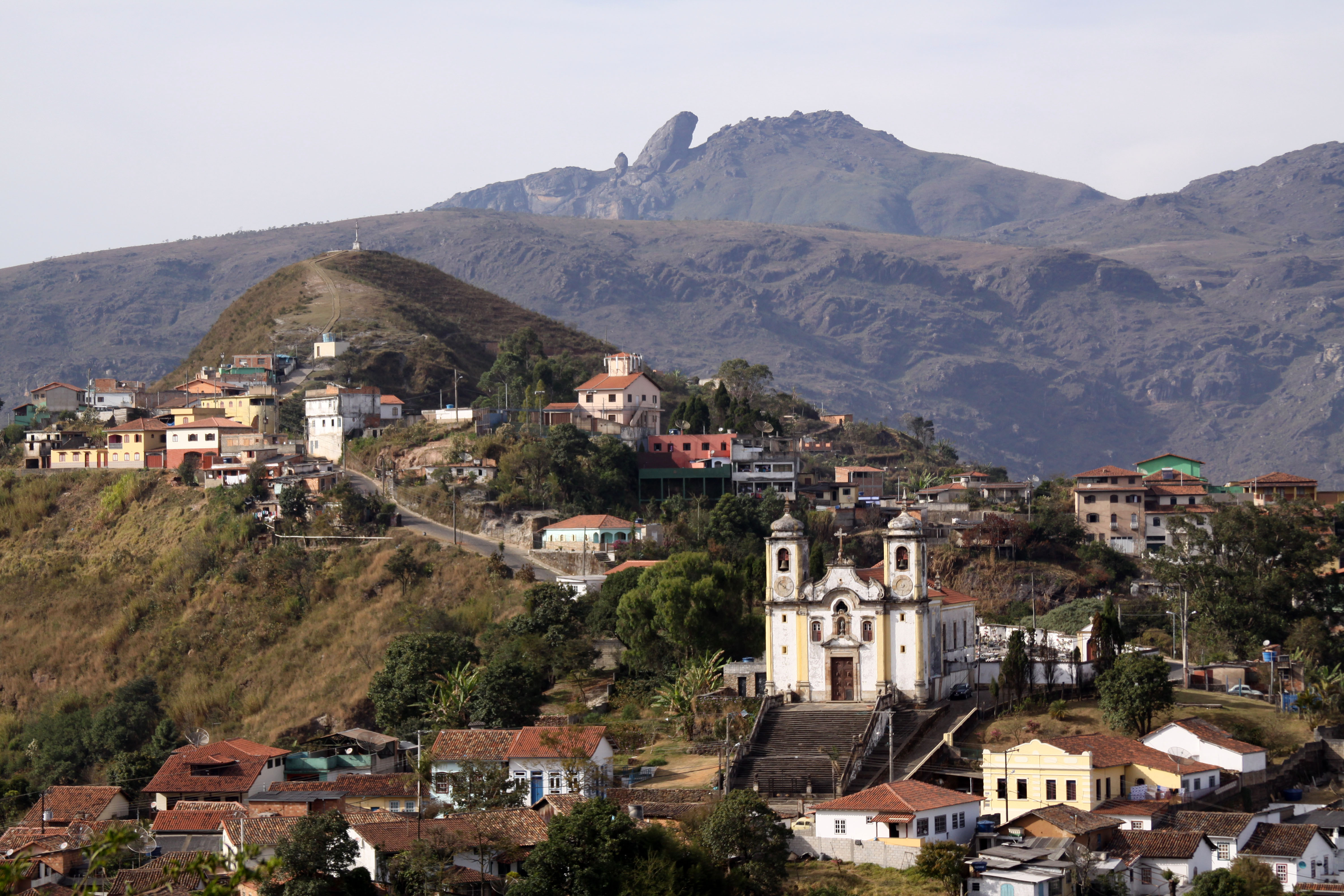 Igreja Matriz de Santa Efigênia e o Pico do Itacolomi em Ouro Preto, Minas Gerais.